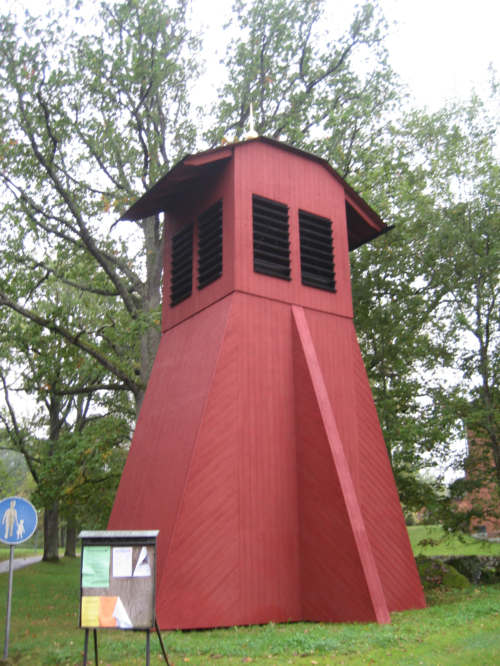 The Belfry of Adolfsbergskyrkan, Örebro, Sweden